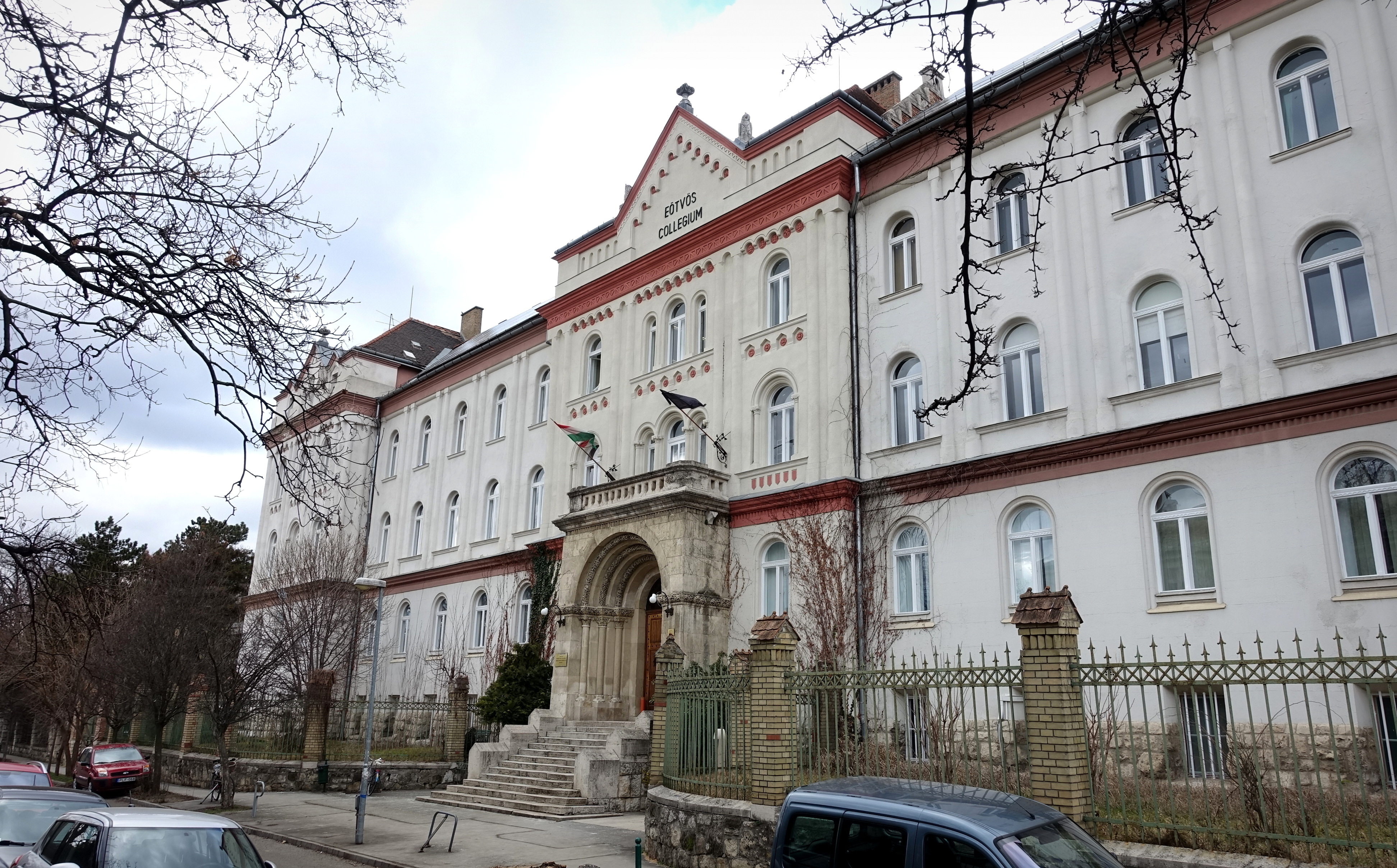 Az Eötvös Collegium épülete a Ménesi úton This is a photo of a monument in Hungary. Identifier: -8216